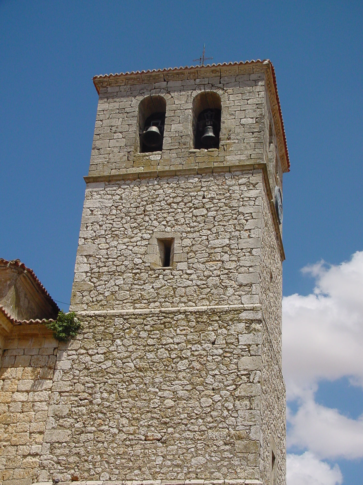 Campanario de Iglesia en Belmonte de Tajo.